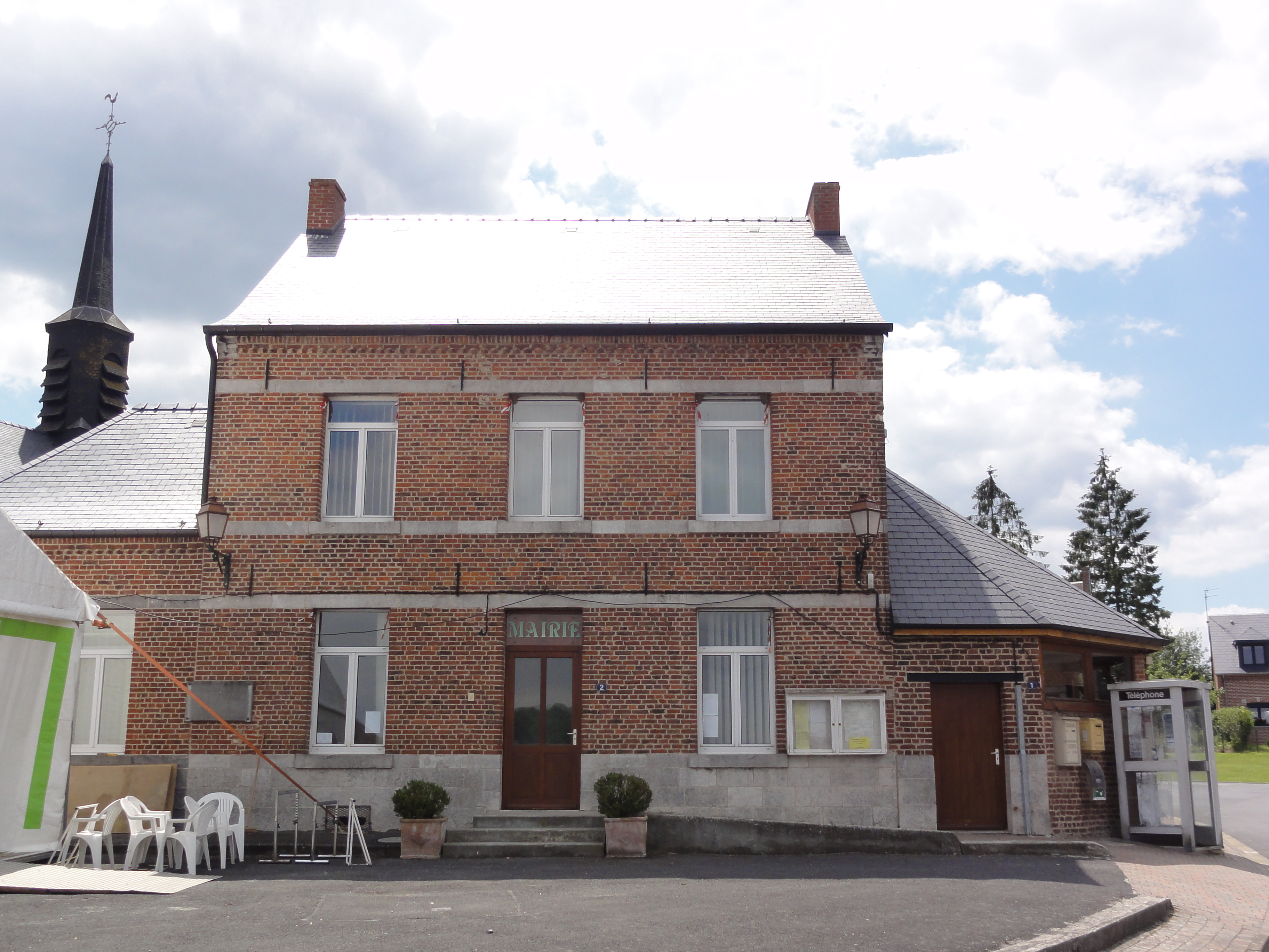 Écuélin (Nord-Fr) mairie avec tour de l'église